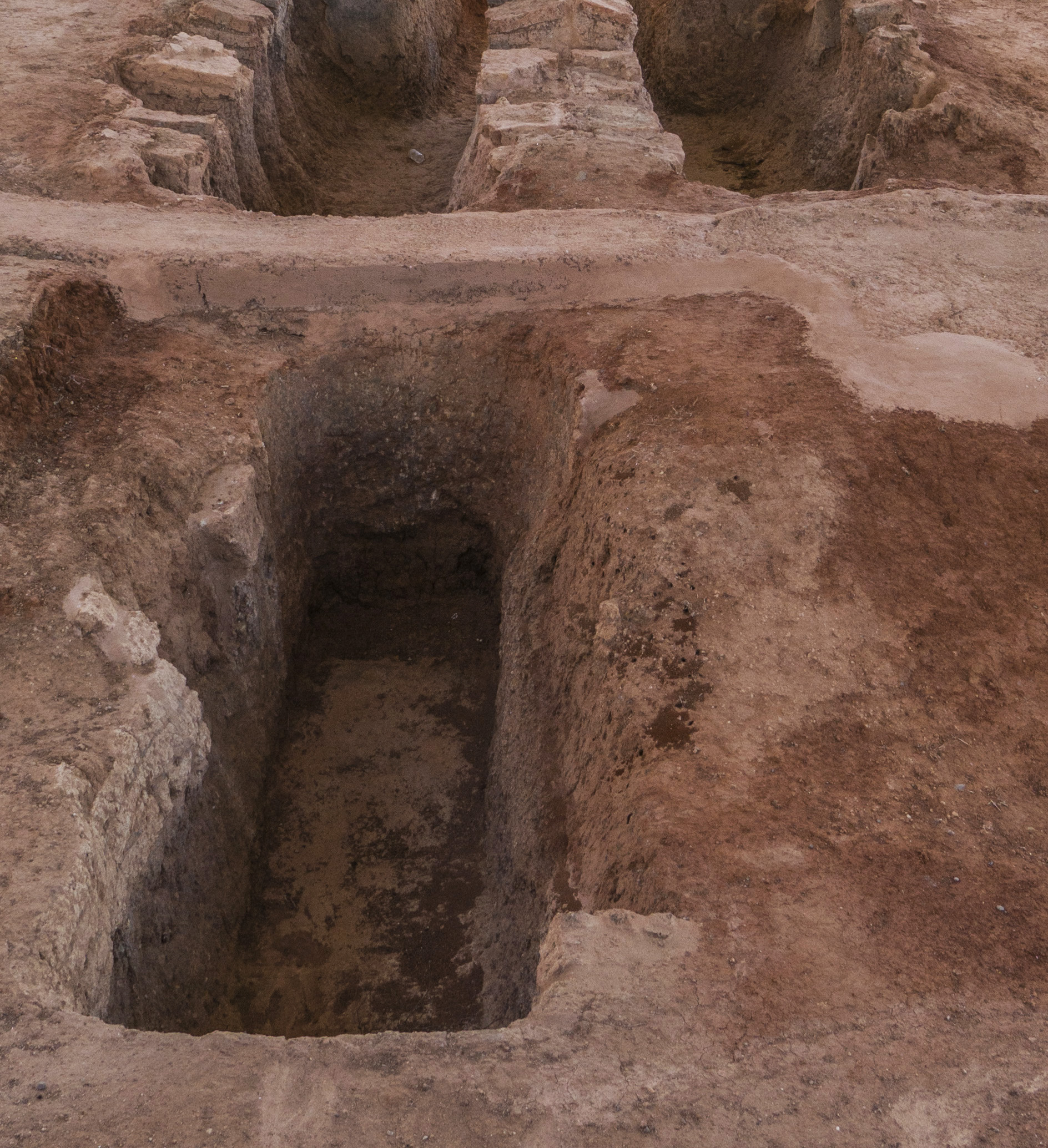 Restes d'una vila romana amb tres forns de terrissa, d'època republicana, segles I i II. (Viquipèdia)